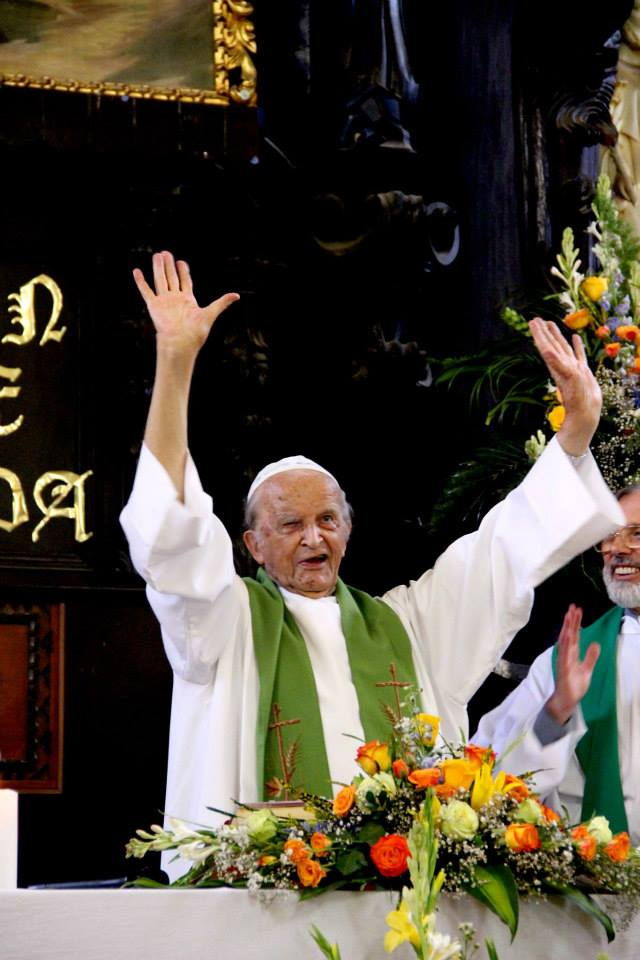 El padre Ugo en una misa del retiro en Lima.